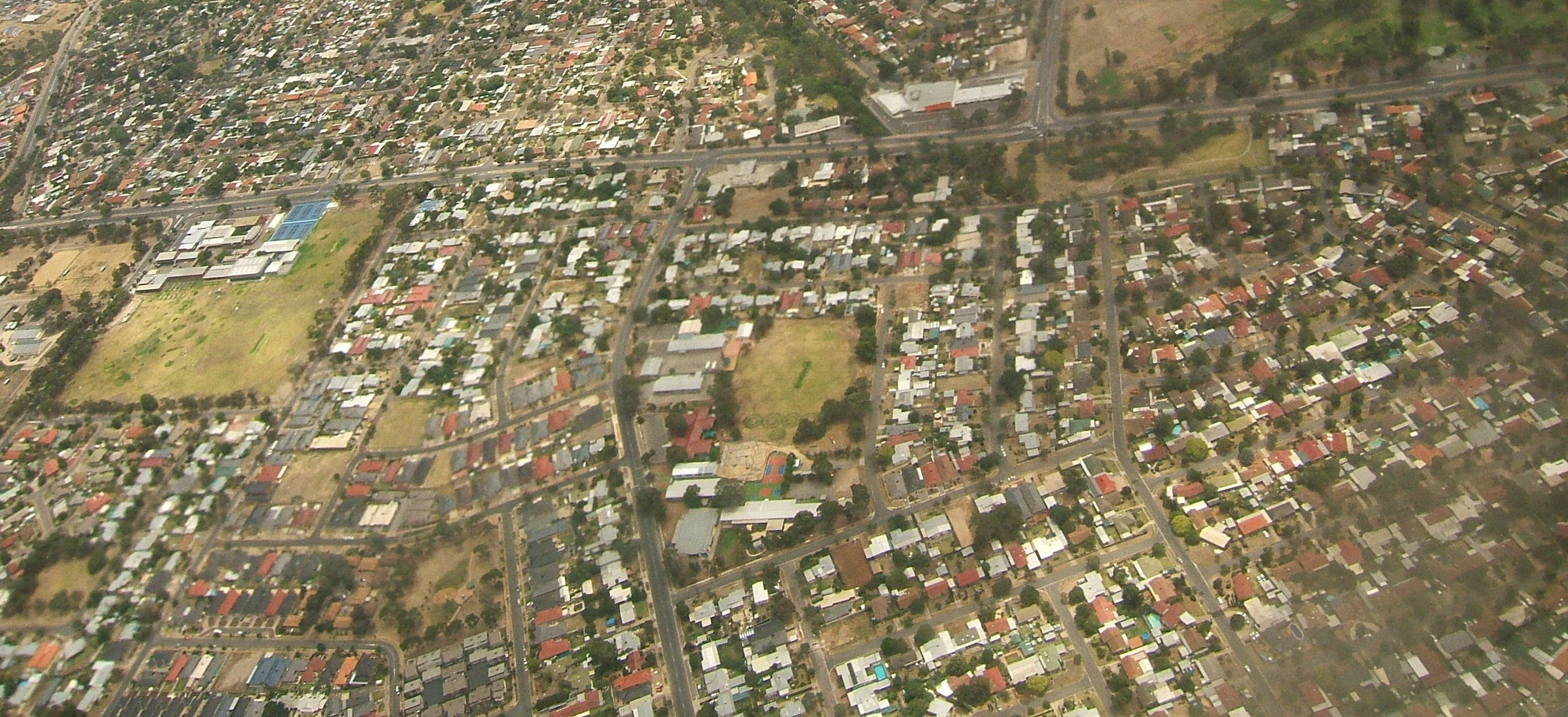 Gilles Plain aerial view, Adelaide